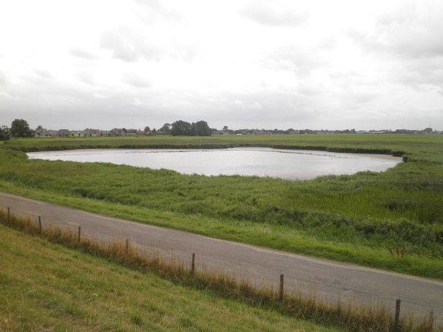 De Koogbraak, een kolk in de Noord-Hollandse gemeente Zeevang nabij Etersheim.